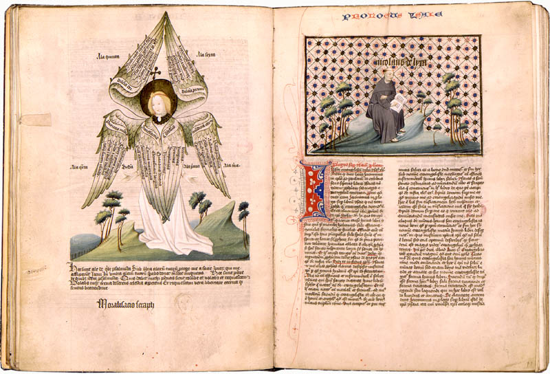 Nicolaus de Lyra, Postillae in Prophetas verlucht rond 1424 te Utrecht door de Meester van Otto van Moerdrecht. De opdrachtgever van het werk was Otto van Moerdrecht.